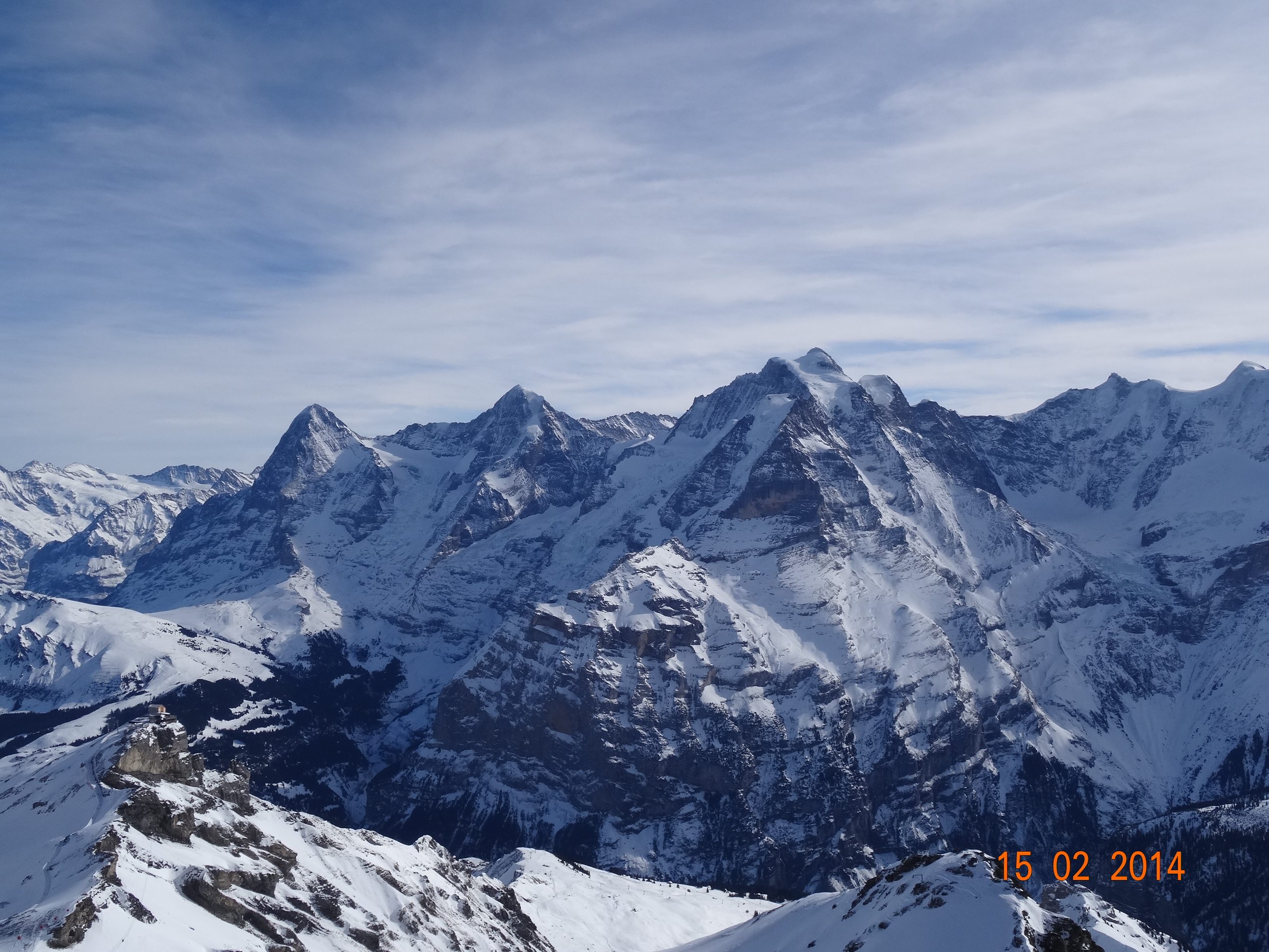 JAMES BOND 007, SCHILTHORN, PIZ GLORIA, FEBRUARY 2014.